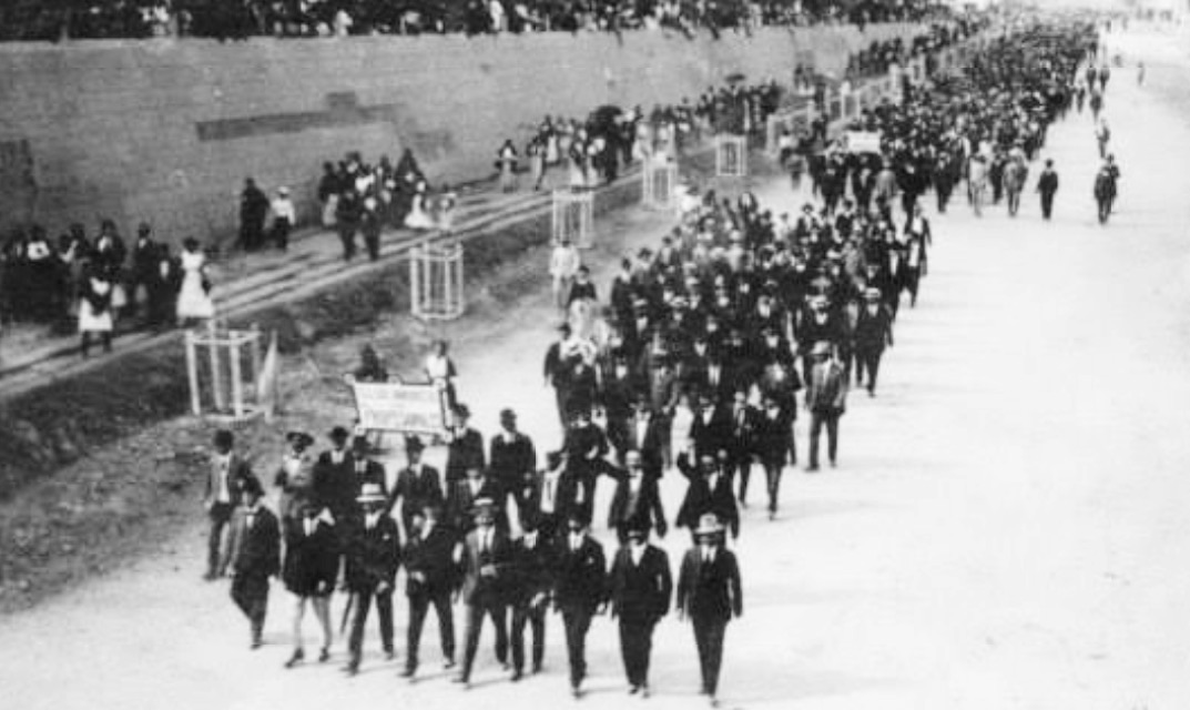 Semana trágica de Guatemala de 1920